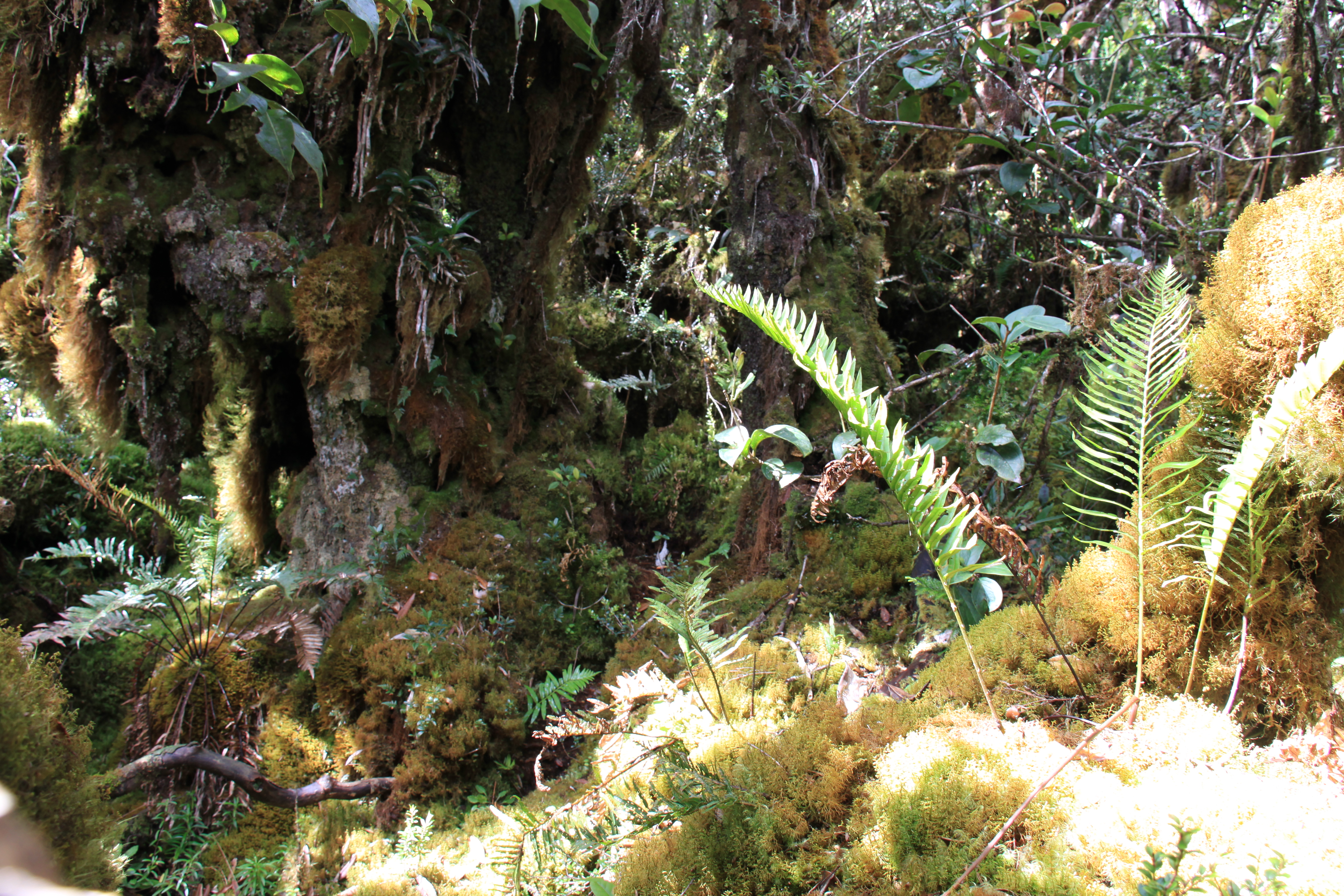 Indonesia, N-Sumatra, Aceh: Mt. Leuser NP (E-slope of Mt. Kemiri), ca. 3000-3200m asl., 17.04.2009